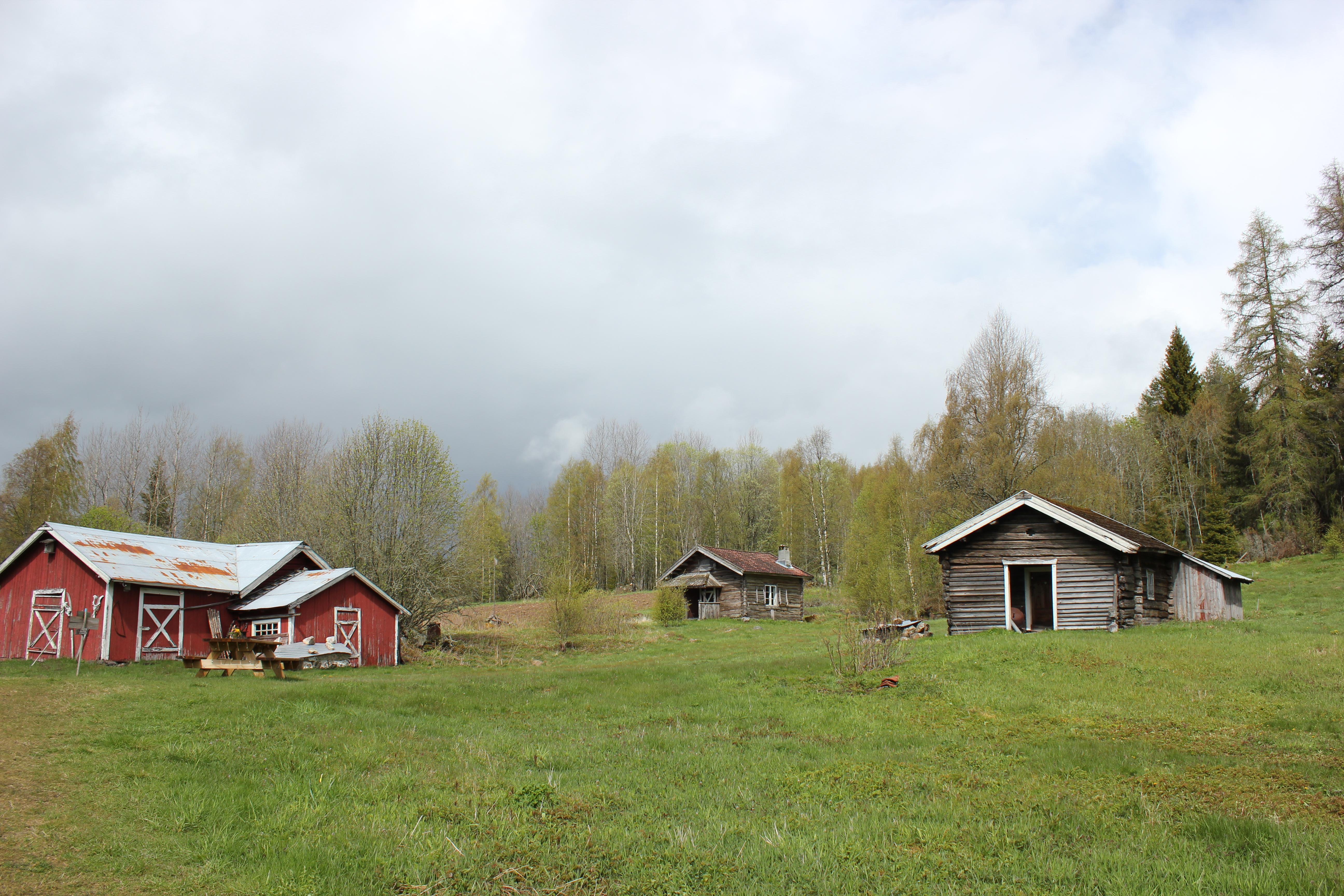 Orala (norsk: Åranstorpet) er et typisk Skogfinsk torp på Vinger Finnskog. Det ligger langs den historiske vandreruten Finnskogrunden